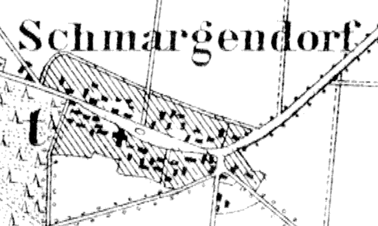 Lageplan von Schmargendorf um 1885